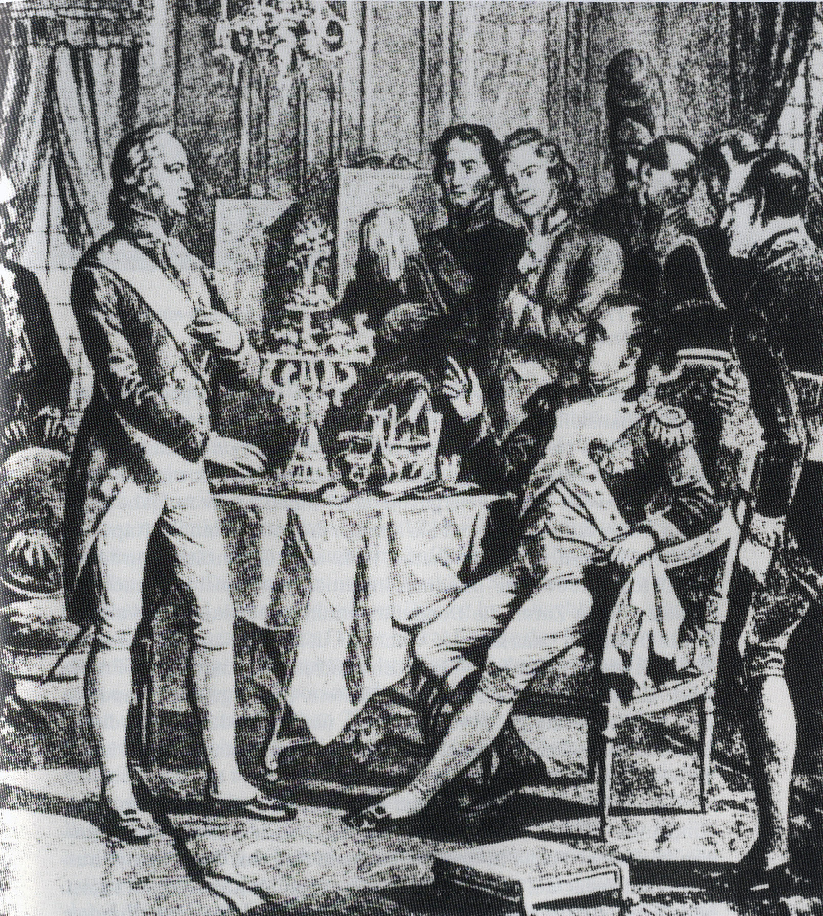 Audienz Johann Wolfgang von Goethes beim französischen Kaiser Napoleon I. im Kaiserlichen Palast am 2. Oktober 1808